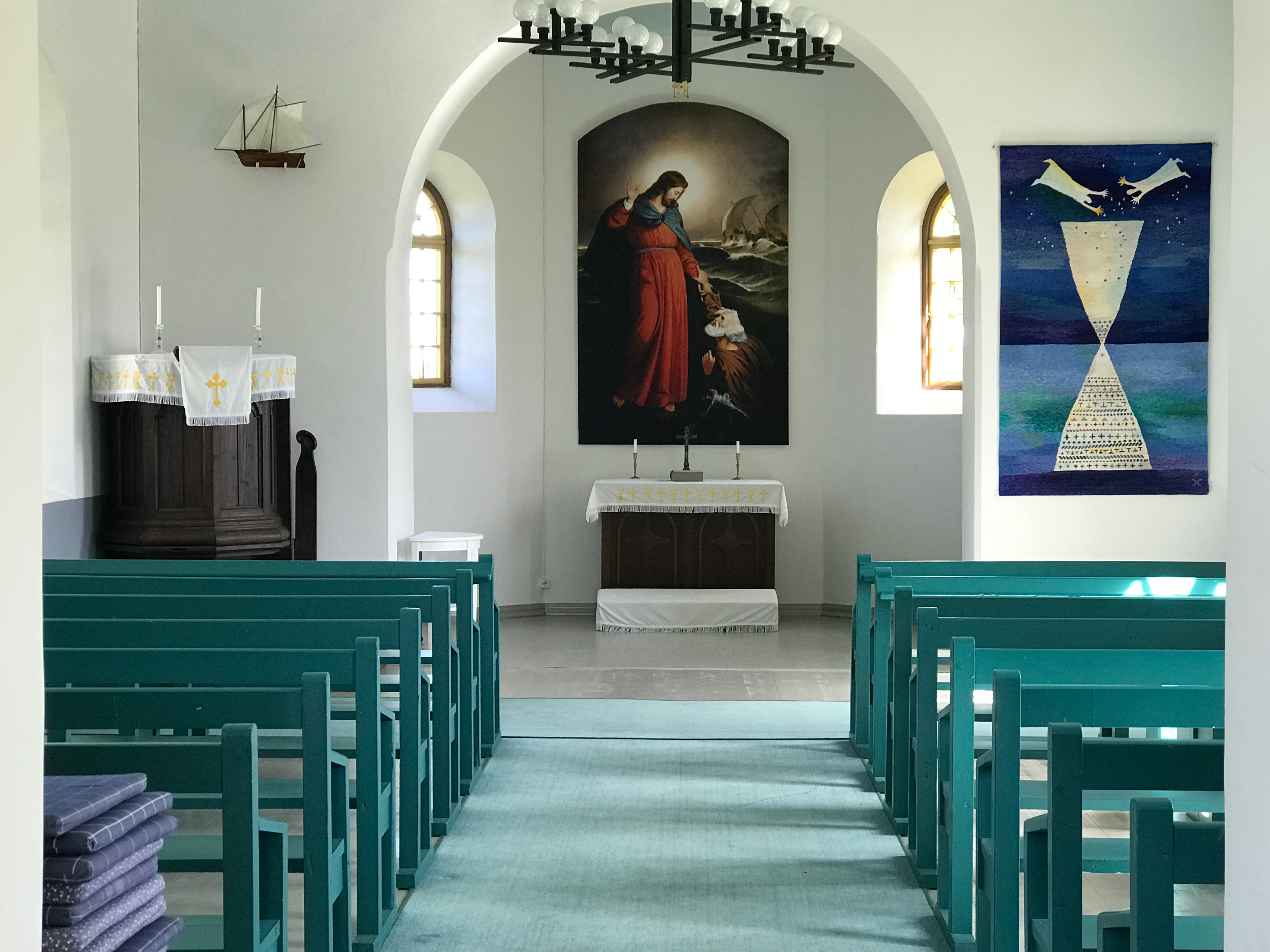 Vainupea kabeli interjöör